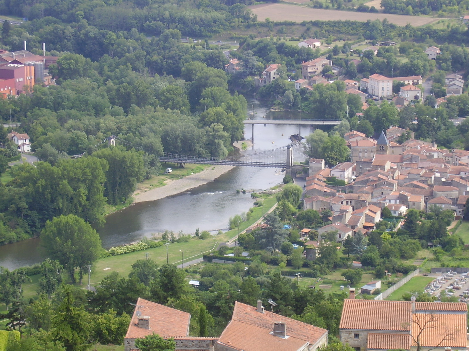 Coudes, les deux ponts et la rivière Allier, « Rivière à Saumons » (Conseil général du Puy-de-Dôme) depuis la tour de Montpeyroux. Puy-de-Dôme, Auvergne, France.